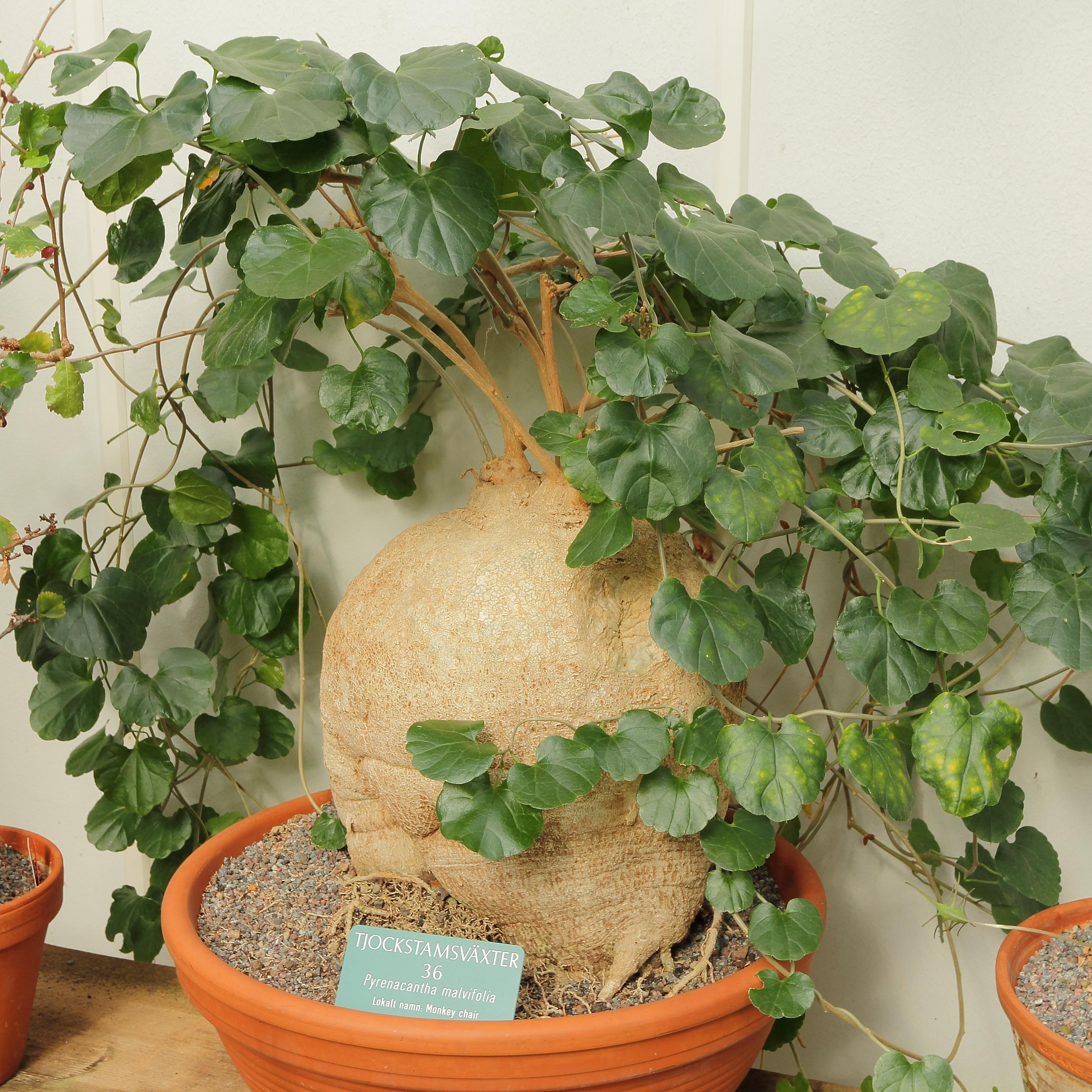 Pyrenacantha malvifolia i Bergianska trädgården.